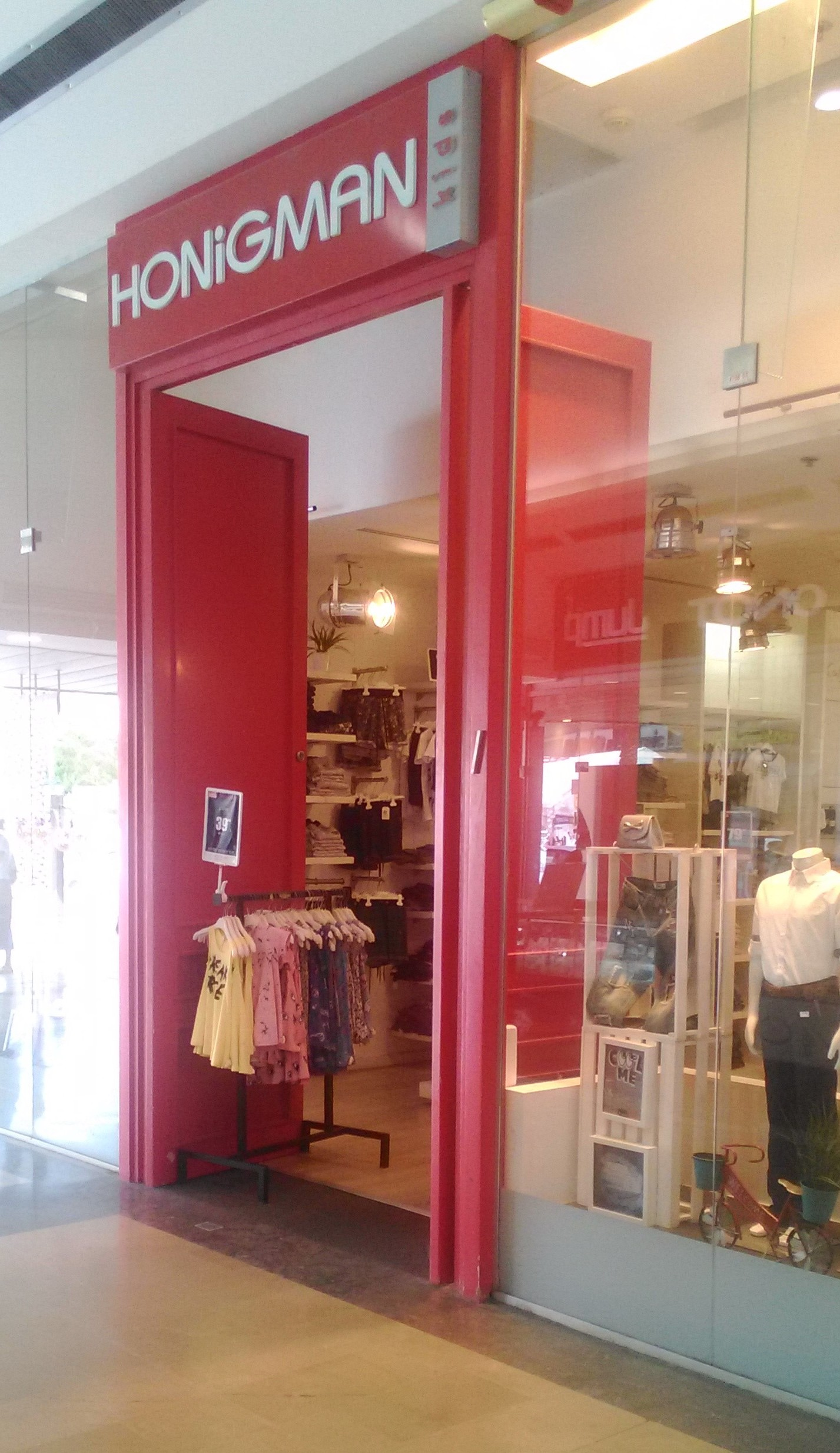 סניף הוניגמן קדס